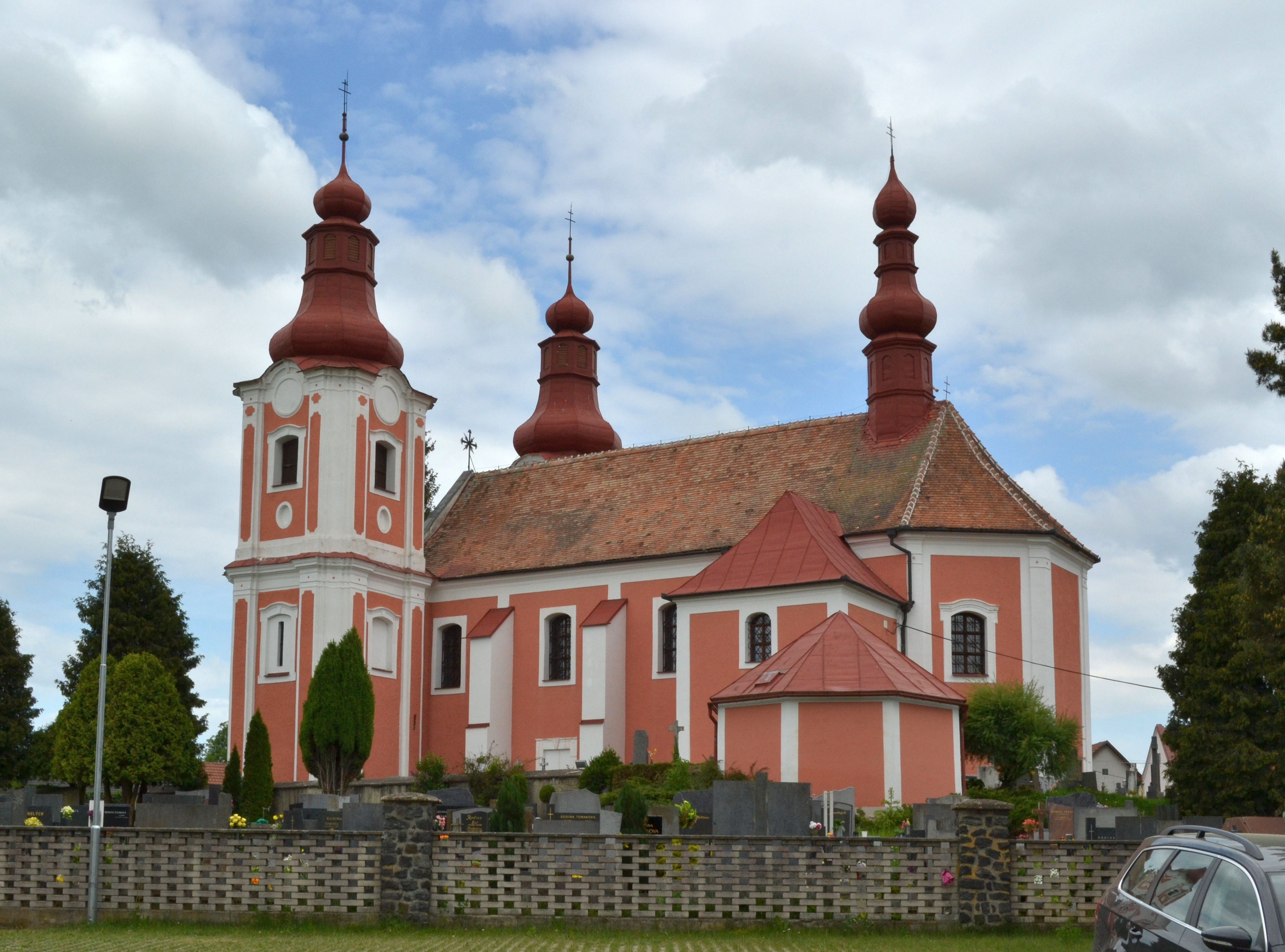 Rozsochy - kostel sv. Bartoloměje, pohled od jihu